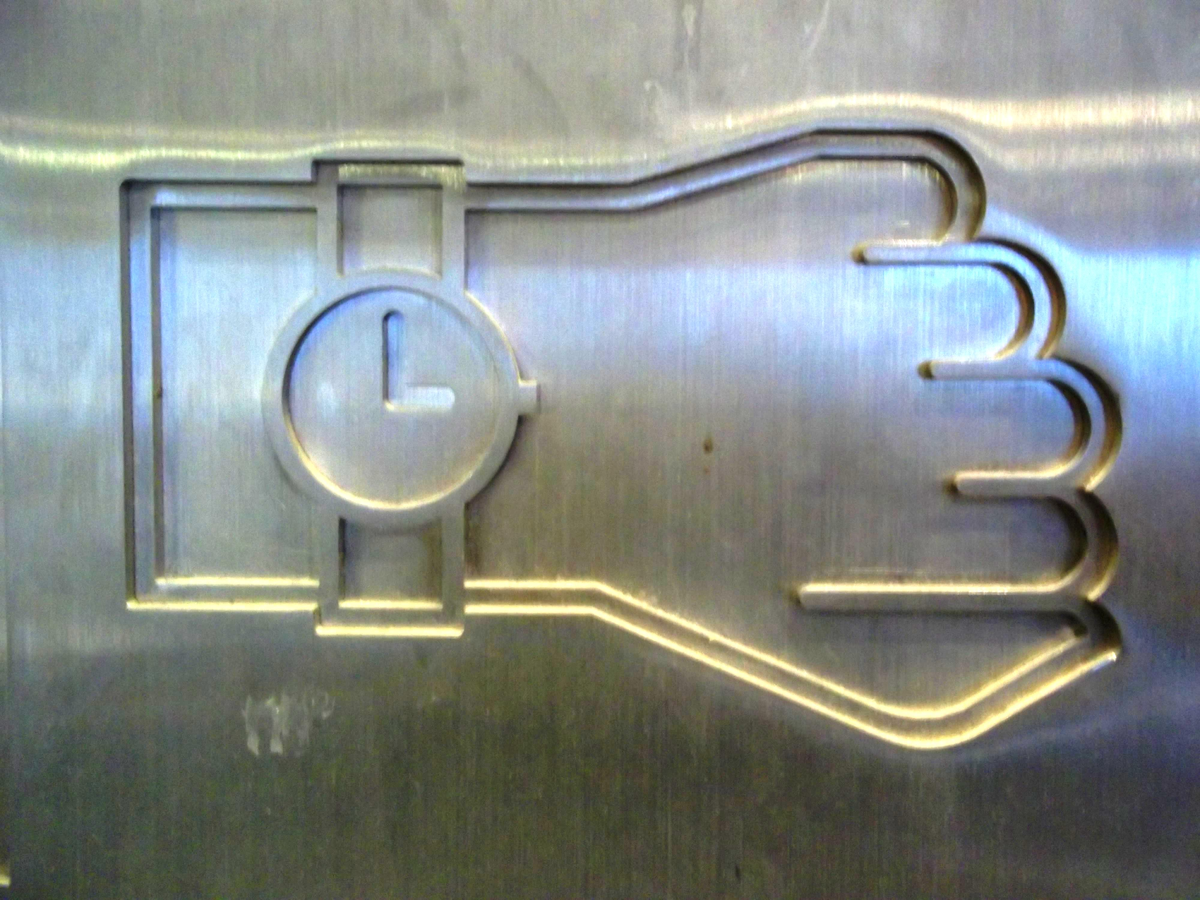 Sculpture de Michel Goulet intitulée Tables, de 2005. Elle est située dans le Montréal souterrain, dans le périmètre du Quartier international de Montréal, à l'entrée de la place Jean-Paul-Riopelle. « J'ai toujours privilégié dans mon travail l'usage d'objets issus du quotidien, des outils, du mobilier domestique mais aussi des signes qui, par convention sociale, sont des précis d'idées et de concepts. Je tiens pour acquis qu'une chaise ou la lettre « A », tout en étant réels, n'ont plus temporairement d'efficacité ou de valeur en soi, mais en tant que signes de quelque chose d'autre. La fonction symbolique de l'art est mieux servie par des associations d'images (ou d'objets) qui animent l'esprit que par celles qui illustrent ou racontent. »